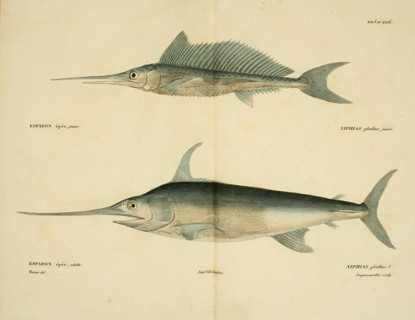 Xiphias gladius juvenile & adult